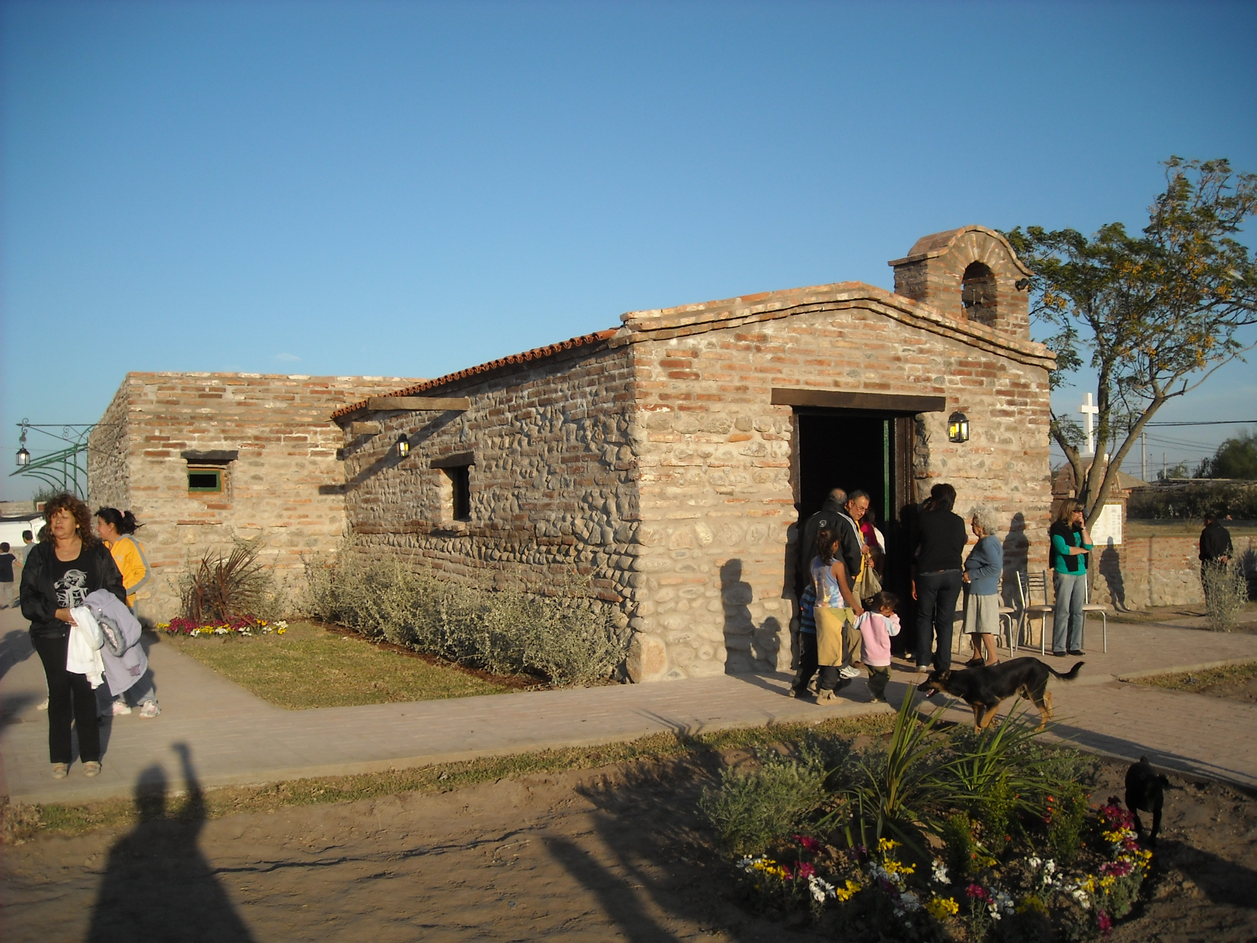 Vista de la Capilla Històrica de San José Obrero recosntruida tras su inauguraciòn en 2011